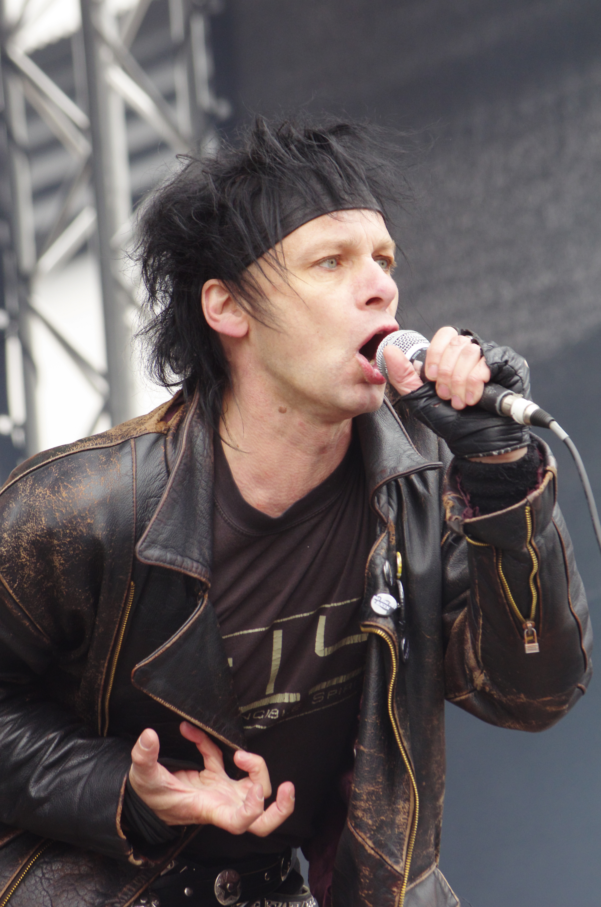 Auftritt bei Rock in den Ruinen 2013 in Dortmund. Myk Jung, Autor, Musiker (The Fair Sex), Kolumnist, als Special Guest